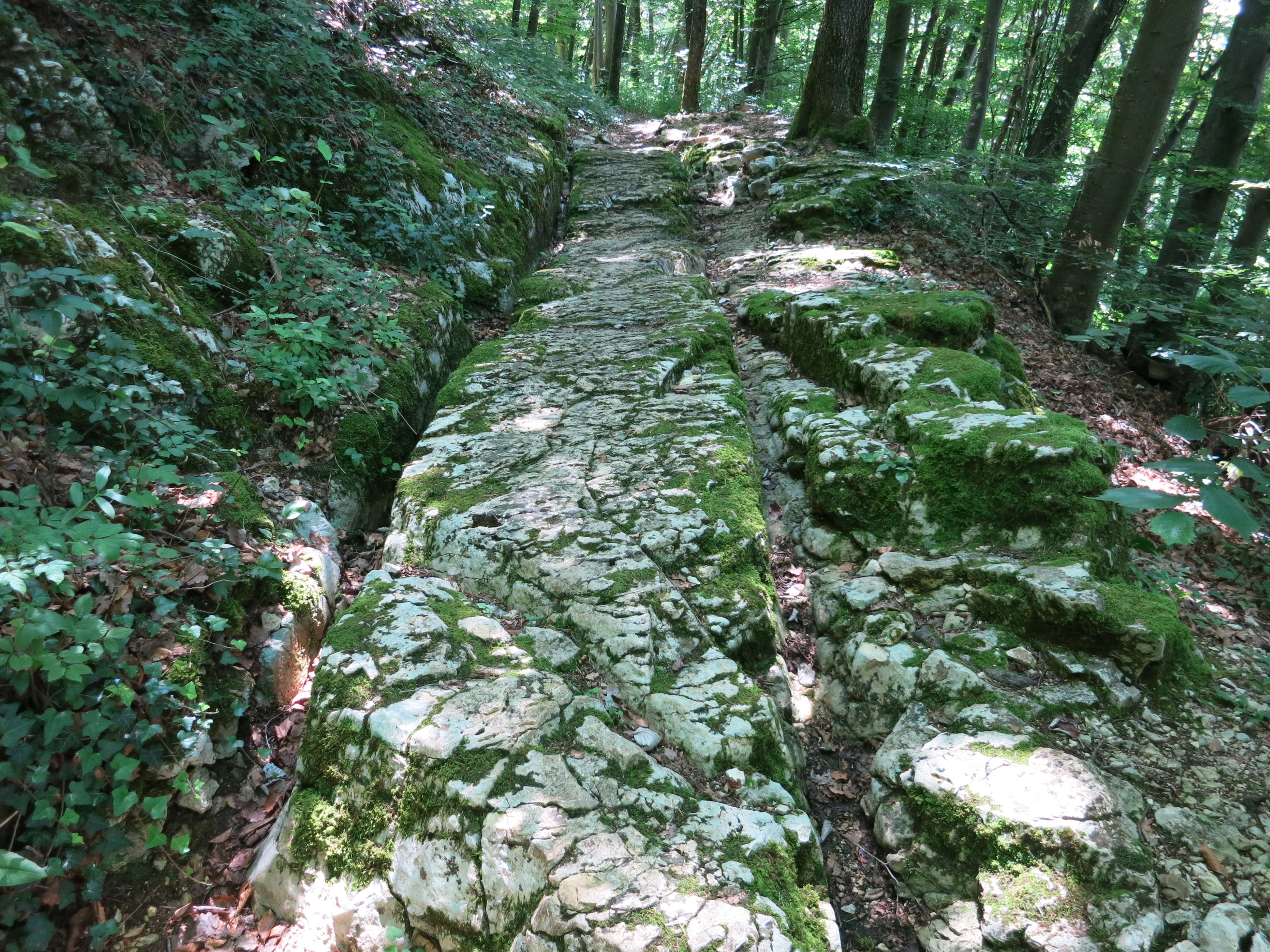 Römerweg, Effingen AG, Schweiz